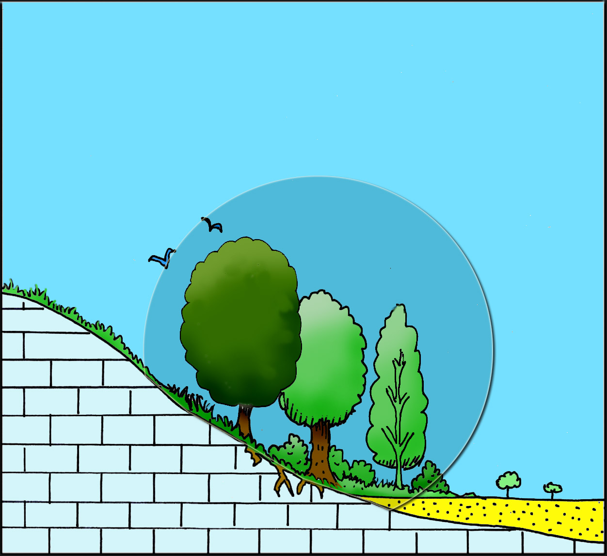 représentation très très simplifiée (vulgarisation de base), d'un biotope ; comme milieu réunissant des conditions d'habitat relativement stables et favorables à un ensemble d'espèces animales, fongiques, végétales, bactériennes (la biocénose). Rem : C'est autant le biotope qui fait que les espèces présentes sont là que l'inverse. Les espèces entretiennent les conditions du biotope.